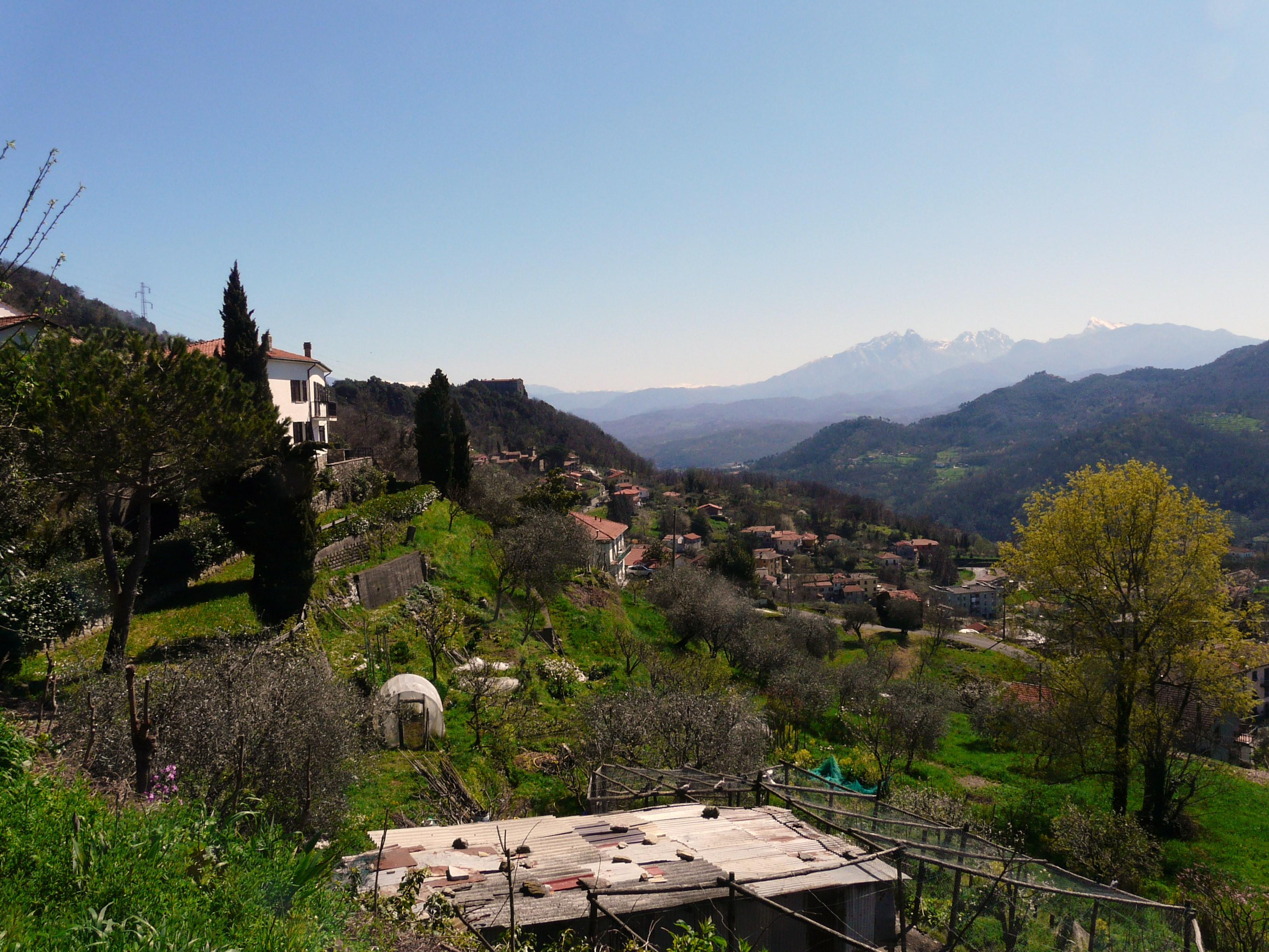 Panorama di Podenzana, Toscana, Italia